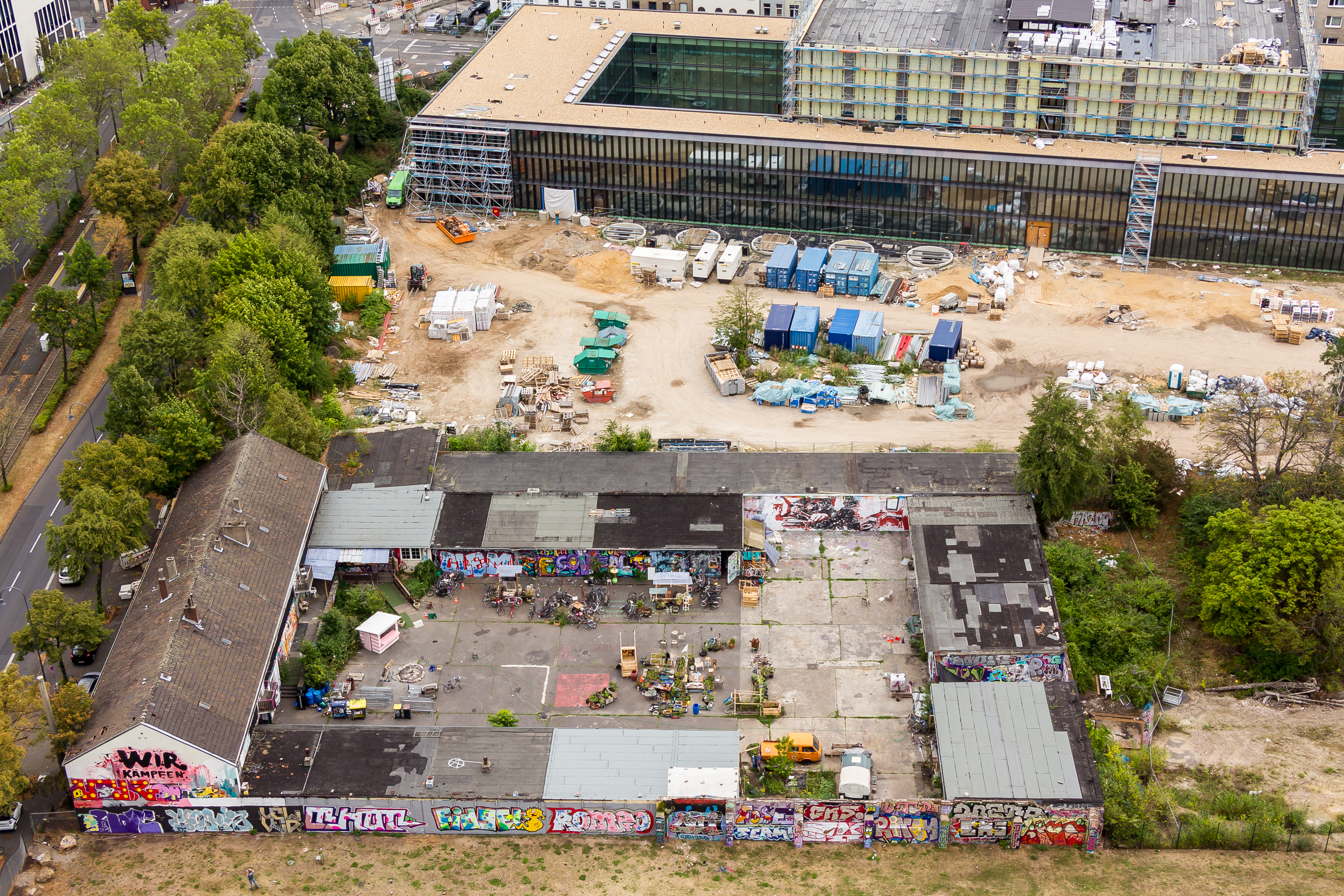 Autonomes Zentrum Köln, Luxemburger Str. 93. Im Hintergrund der Archivneubau Eifelwall